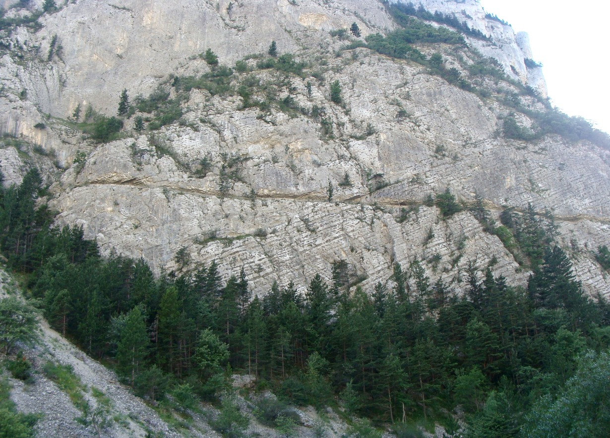 L'entaille du canal de Pellafol dans la falaise du défilé de la Souloise.